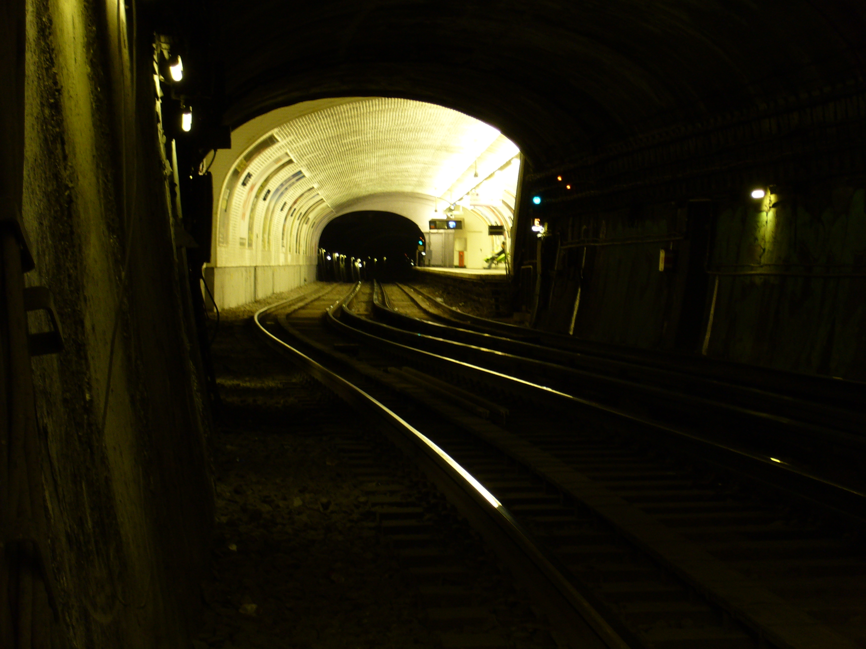 Quai décalé de la station Commerce sur la ligne 8 du métro parisien.